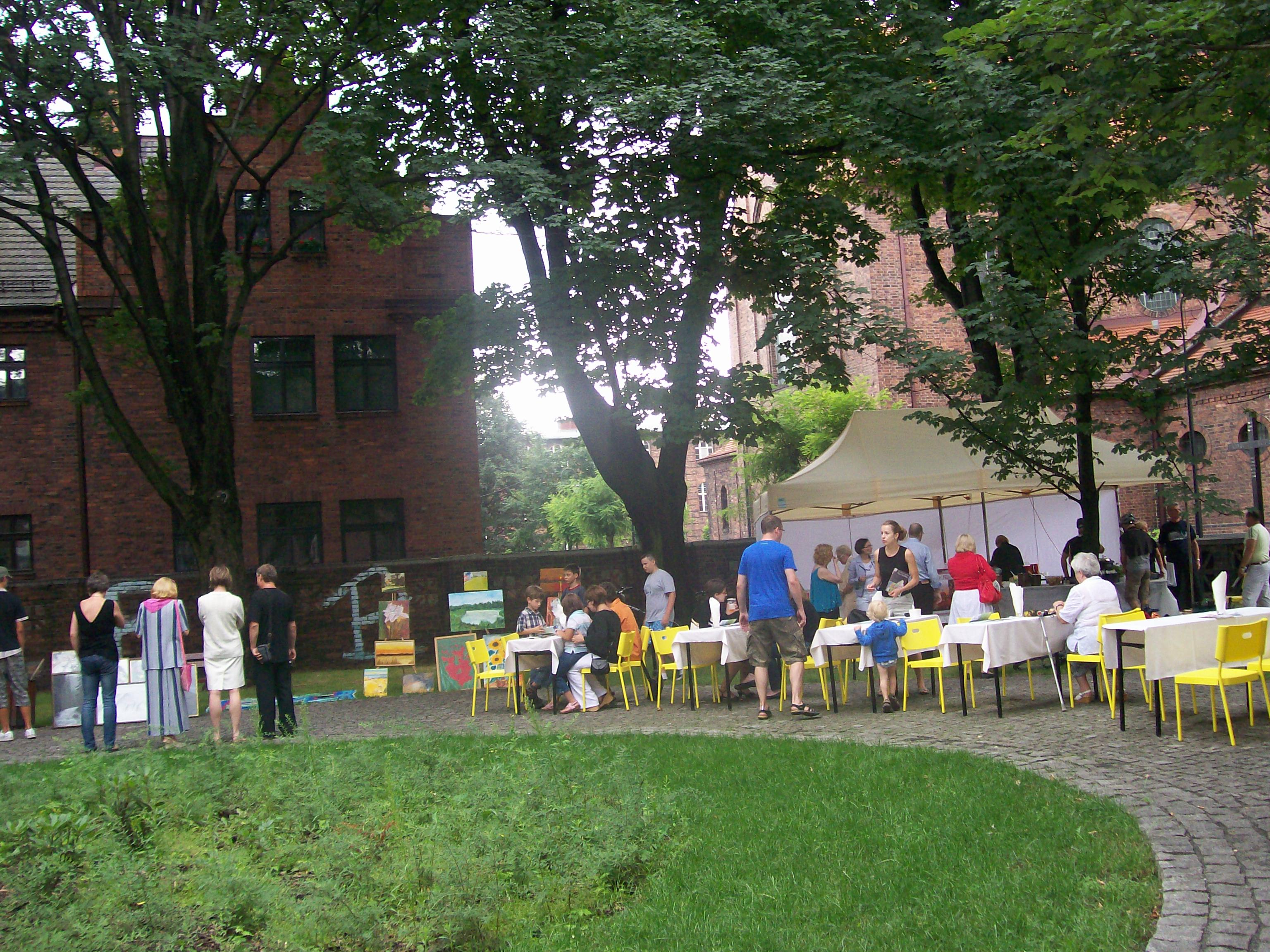 Osiedle robotnicze z lat 1908-1918, obejmujące ulice: księdza Ficka, Giszowiecka, Odrowążów, Czechowa, Janowska, świętej Anny, Garbarska, Rymarska, Nałkowskiej, Szopienicka, Plac Wyzwolenia Katowice, Nikiszowiec, Katowice 08.1978.